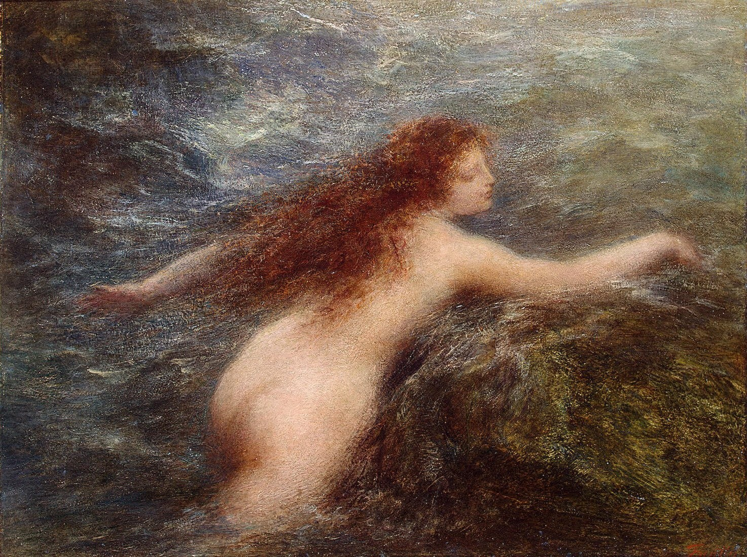 Naïade, musée de l'Hermitage, St Petersboug